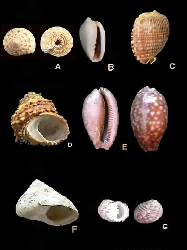 Moluscos del estado Falcón - Venezuela A. Architectonica nobilis B. Bulla solida C. Cypraeacassis testiculus D. Astraea caelata E: Cypraea zebra F. Cittarium pica G. Nerita versicolor